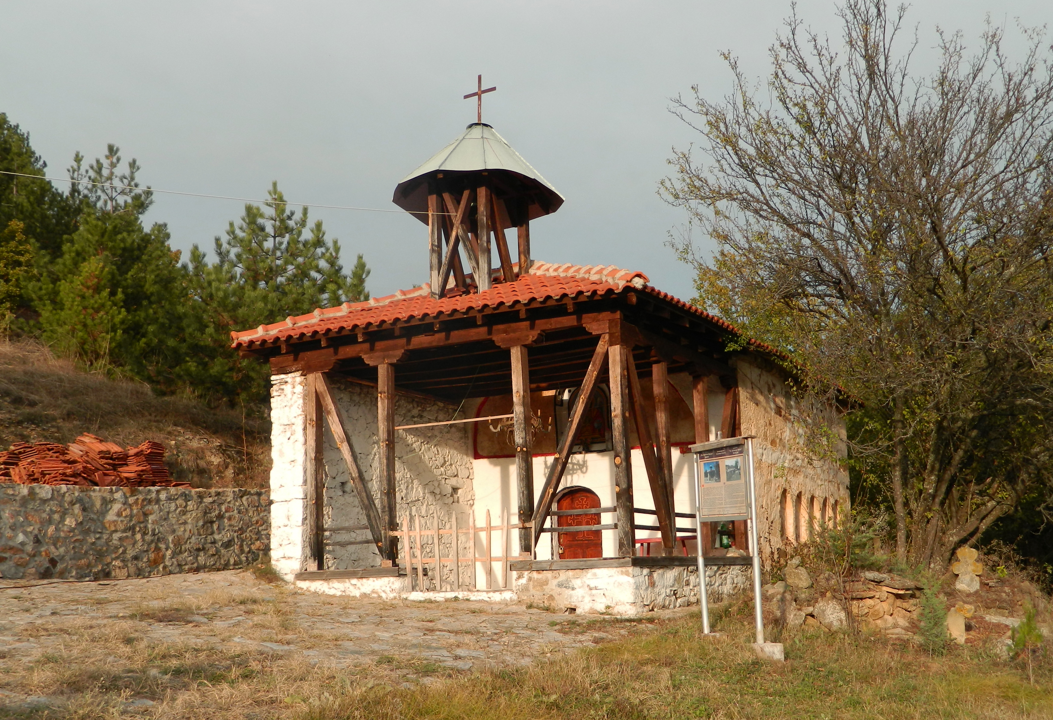 црква Свети Архангел Михаил село.Драмче,Делчево